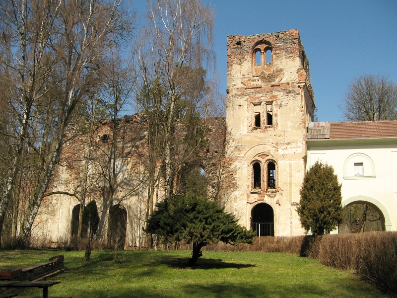 Paulánský klášter, Světce 1